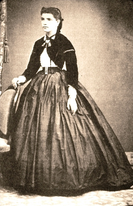 Carmela Carvajal Briones (1851 - 1931), viuda del héroe naval chileno Arturo Prat Chacón.